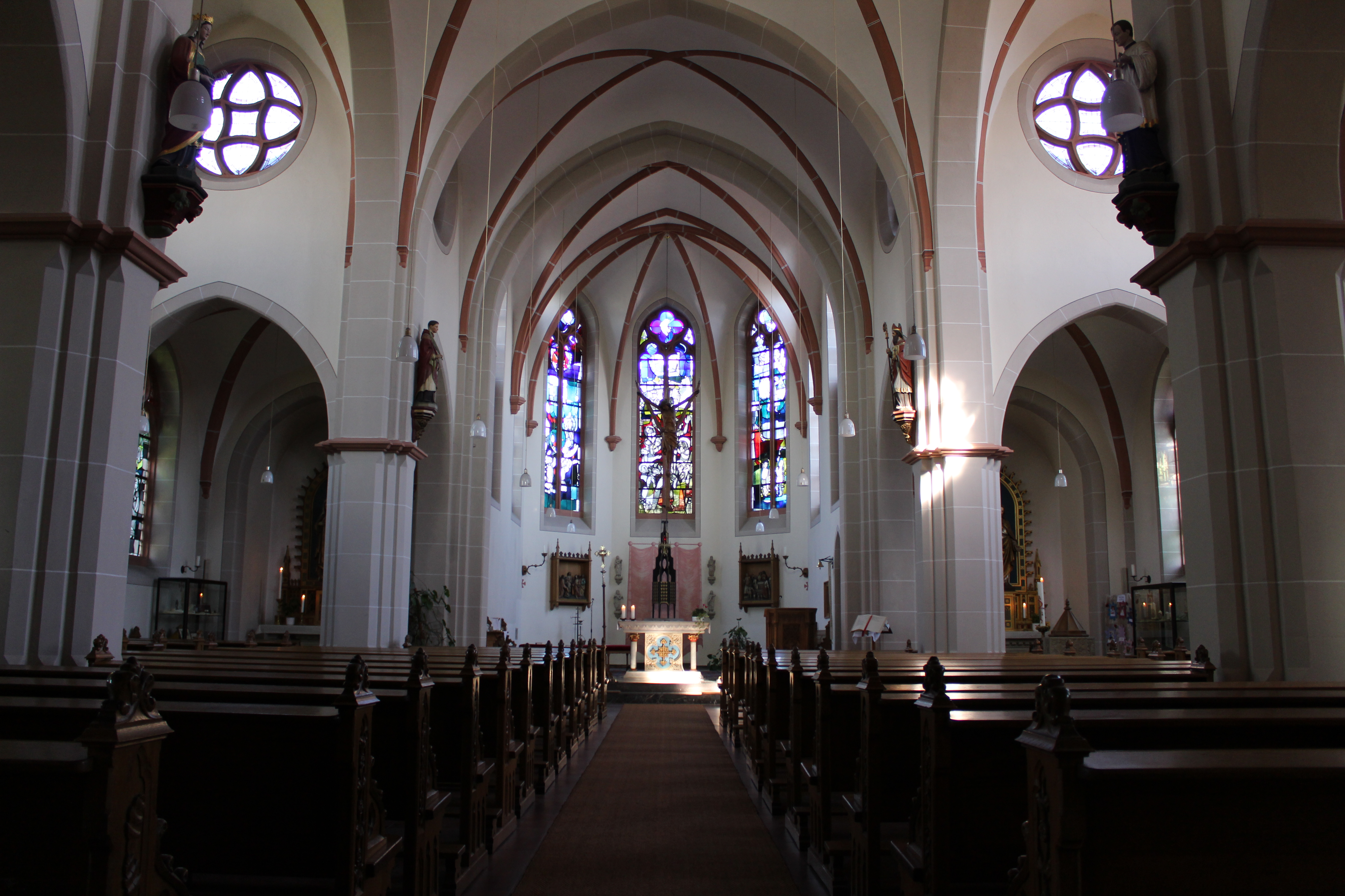 Blick vom Haupteingang aus in den Innenraum der Manheimer Kirche.